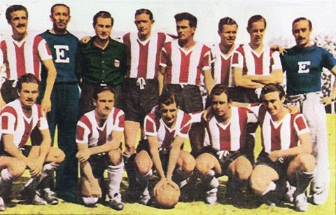 Una formación del equipo de Estudiantes de La Plata en 1944, cuando se consagró campeón de la Copa Escobar, torneo oficial, no regular, que se disputó entre equipos de la Primera División de Argentina , con interrupciones, entre 1939 y 1949.